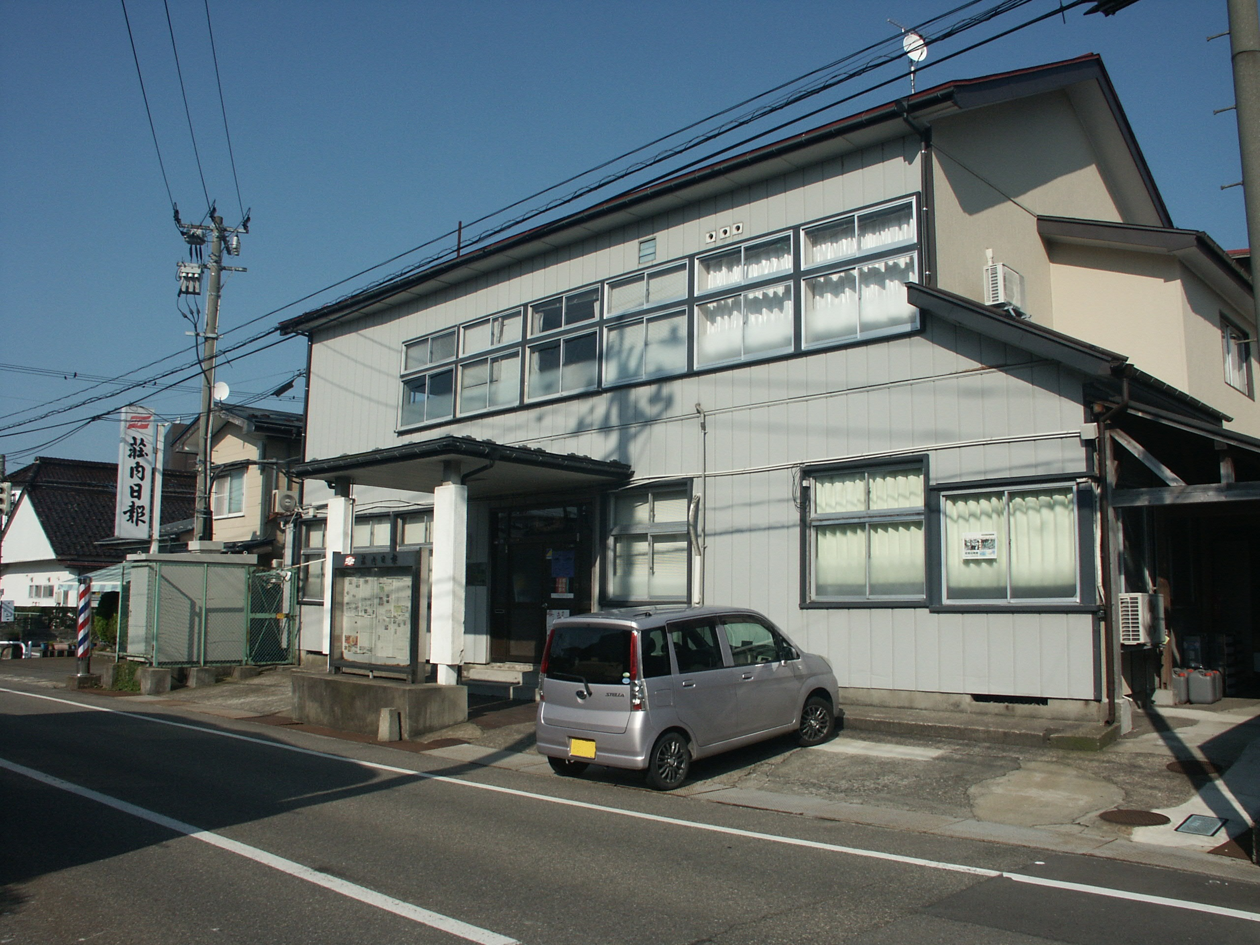 山形県鶴岡市に所在する荘内日報本社